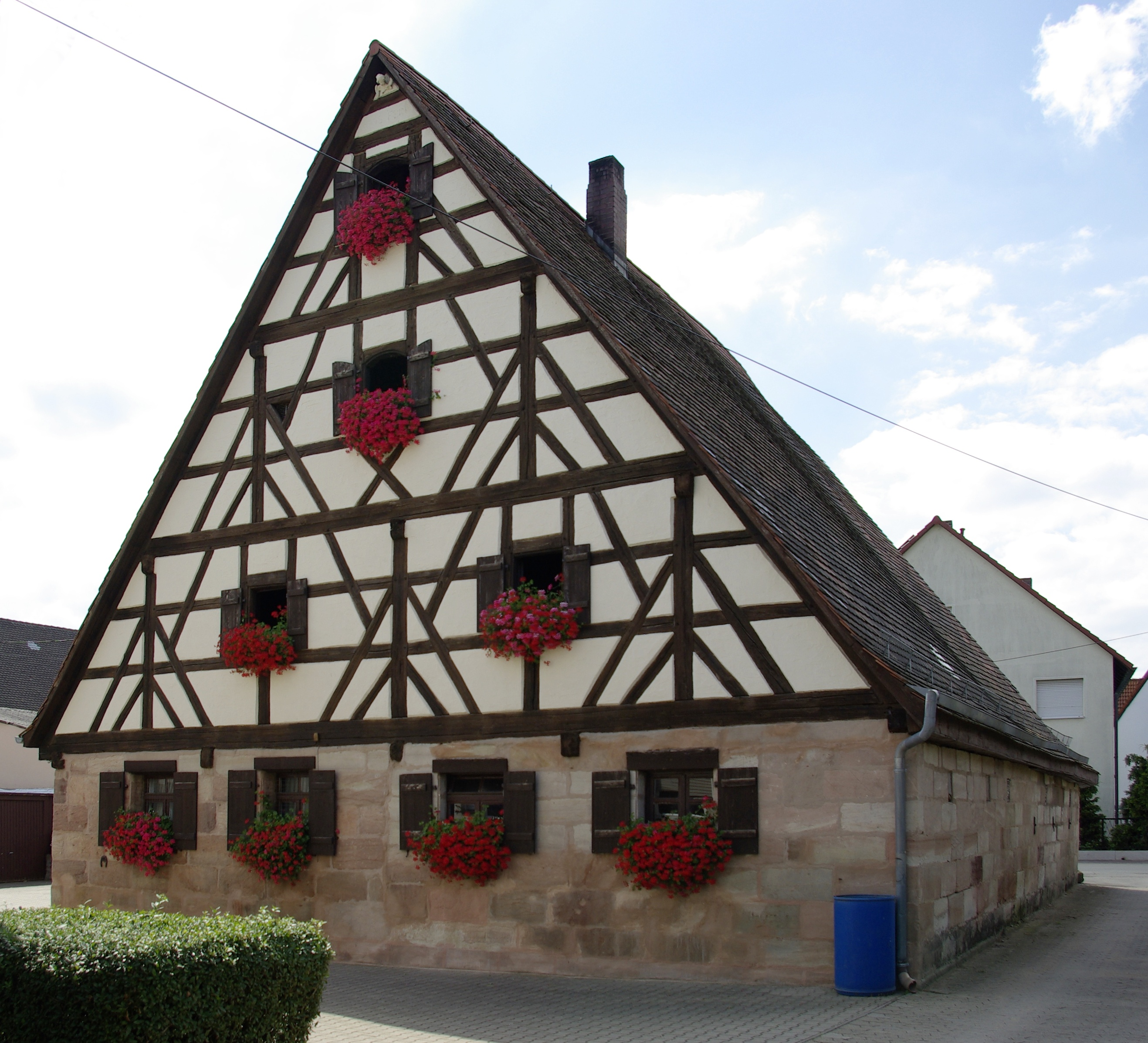 Blütenstraße 2 im Fürther Stadtteil Sack